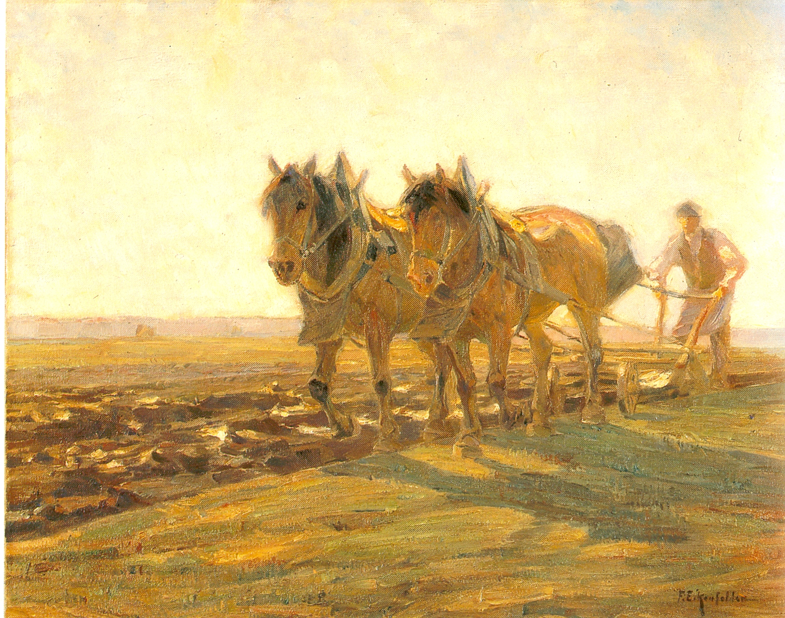 Zwei pflügende Braune bei Dachau Öl/Leinwand/Holz 55,5*70,5 cm Privat